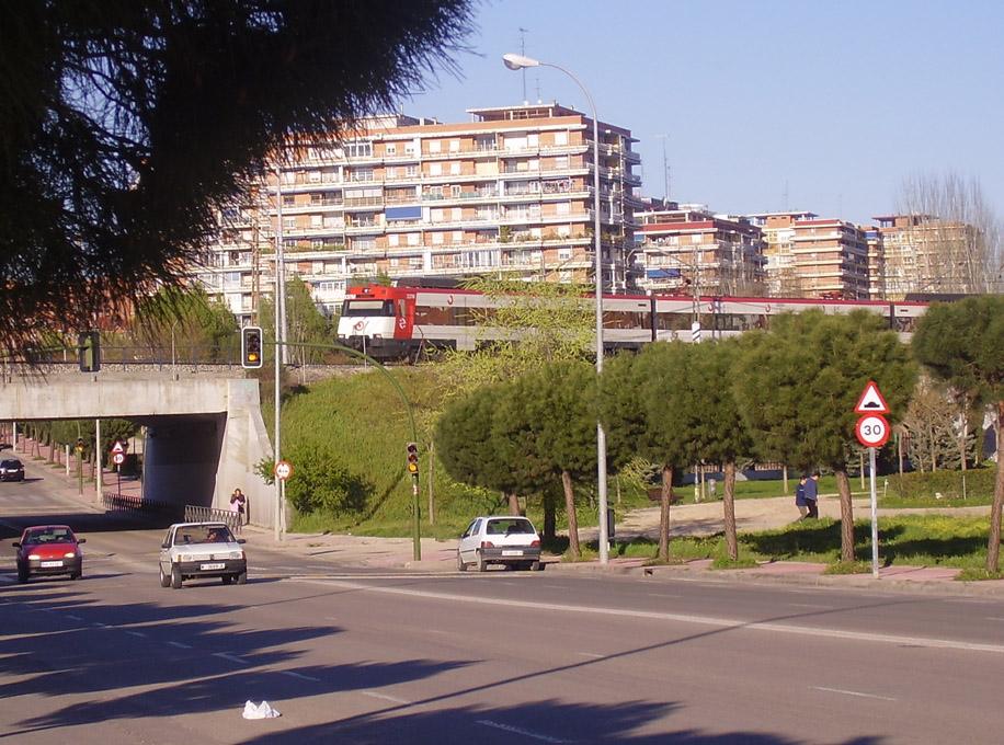 Infraestructuras de transporte en Móstoles (Comunidad de Madrid, España)